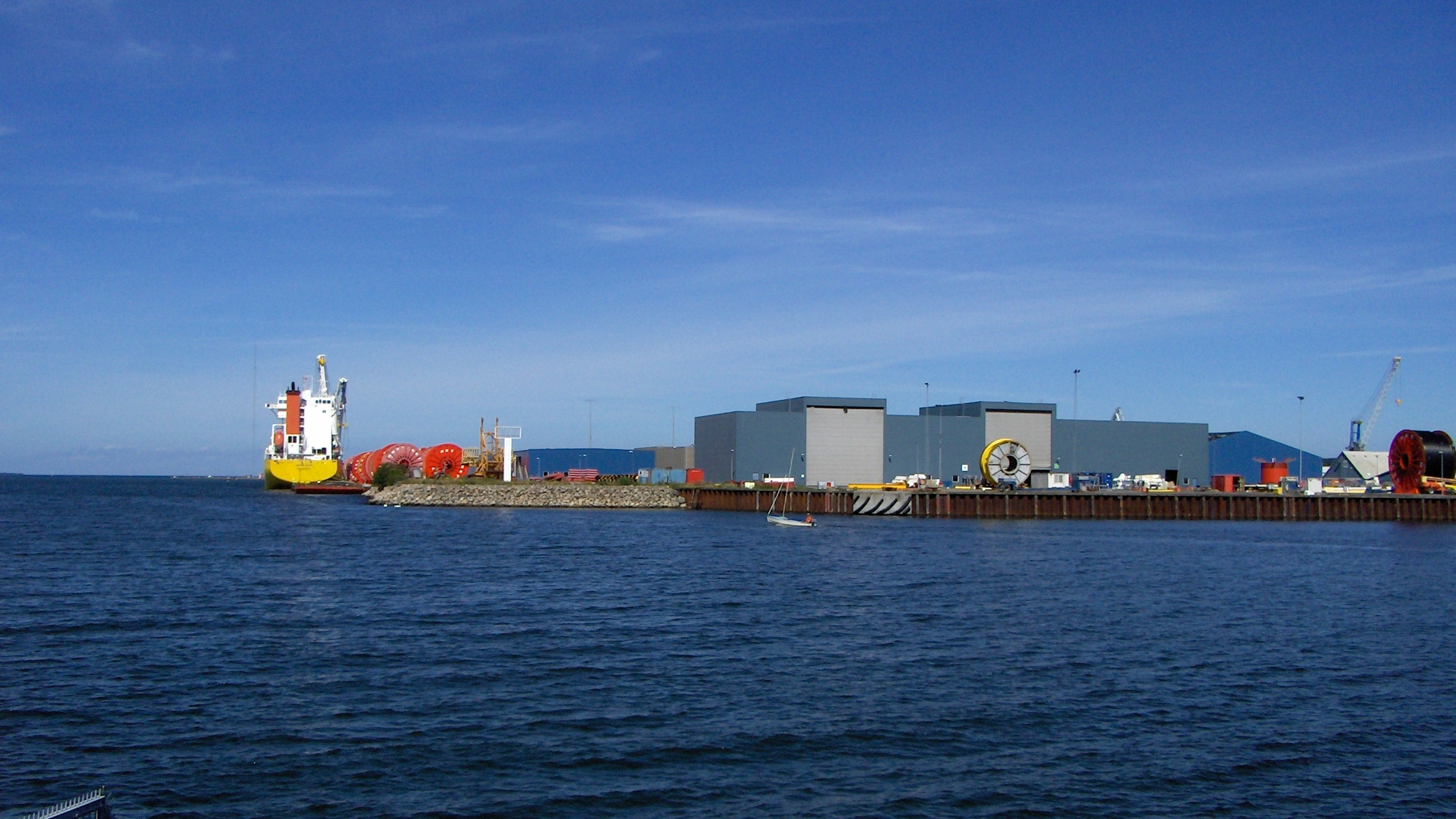 NKT Flexibles in Kalundborg